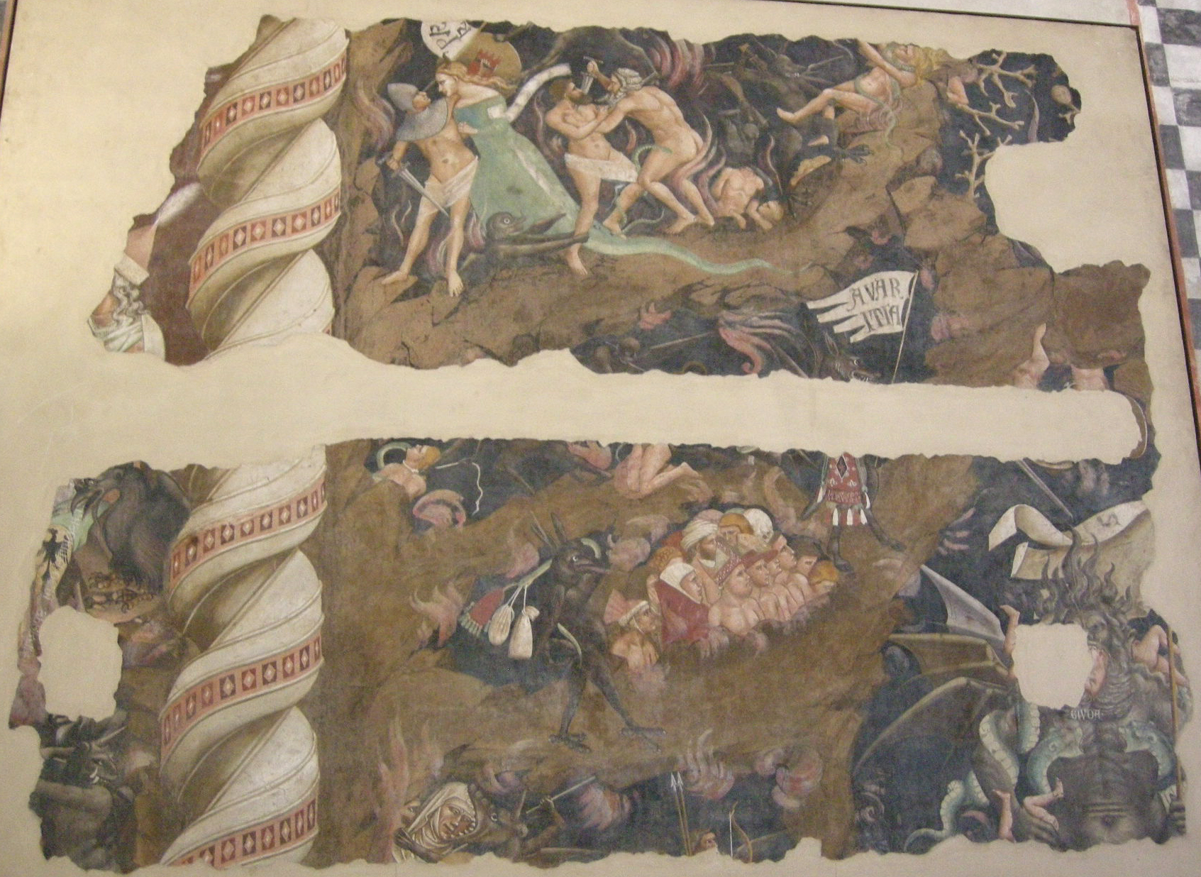 Refettorio santa croce, frammento di andrea orcagna